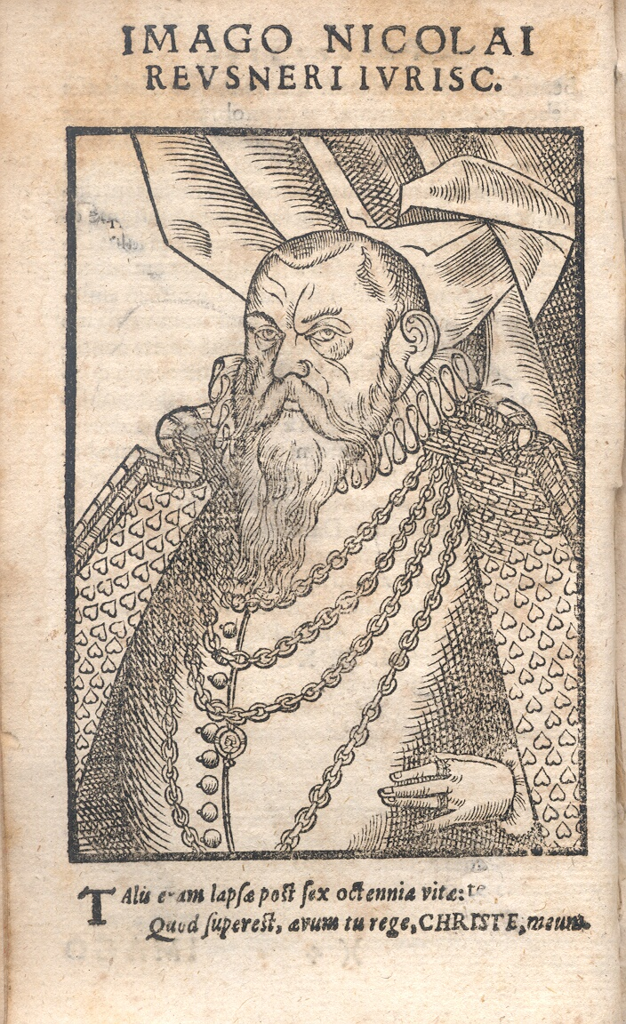 Nikolaus von Reusner (1545-1602), in einem seiner Bücher veröffentlichtes Selbstbildnis